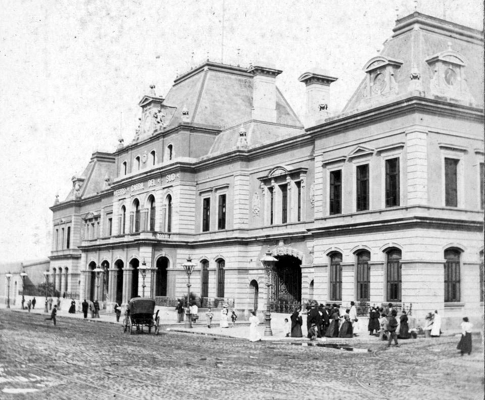 Fachada de la Estación Constitución. Segundo edificio, terminado hacia 1887 y diseñado por Parr, Strong & Parr; de Londres. Demolido parcialmente en 1898 para construir el actual edificio.